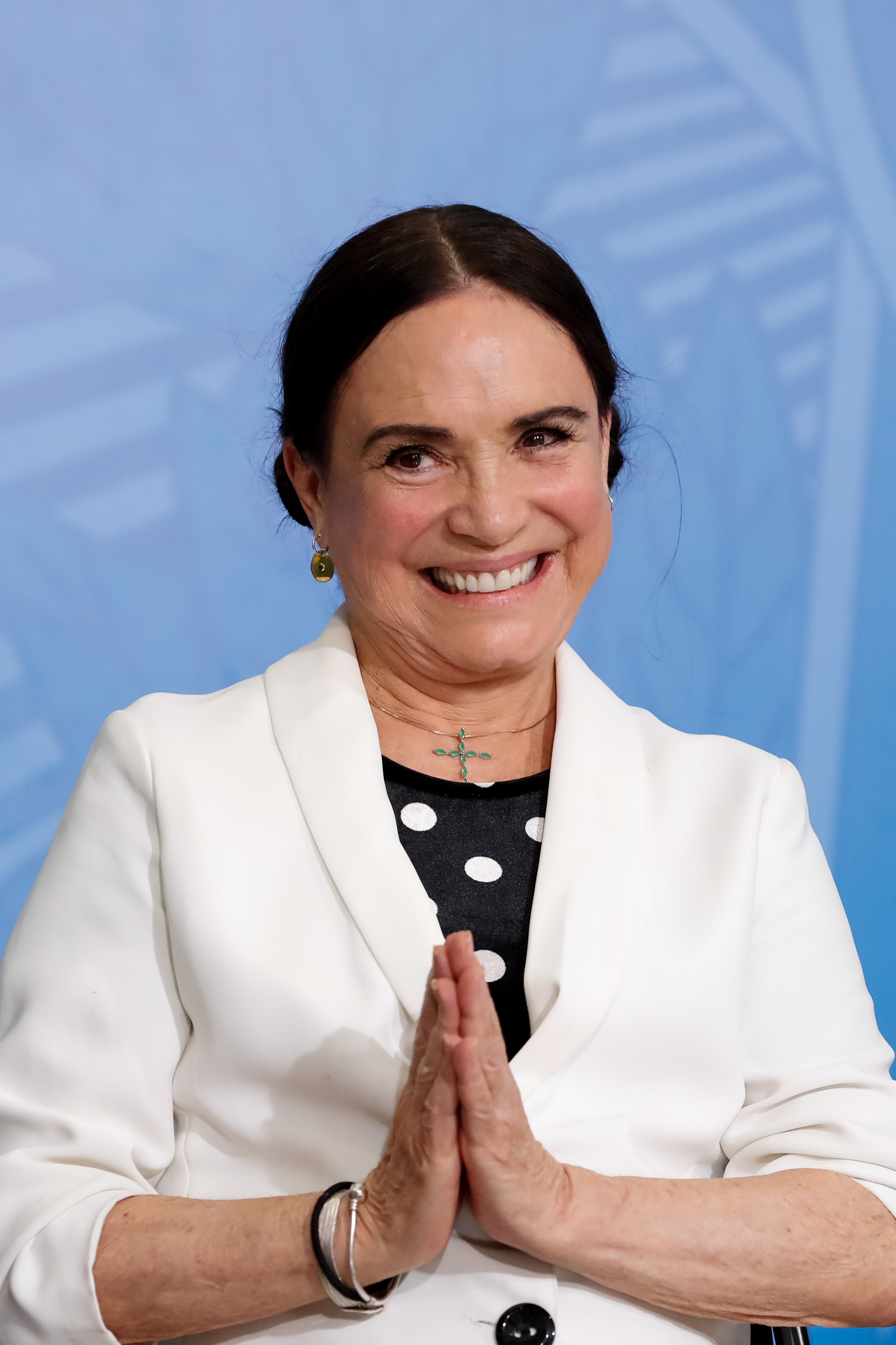 (Brasília - DF, 04/03/2020) Presidente da República Jair Bolsonaro, durante cerimônia de Posse da Secretária Especial da Cultura do Ministério do Turismo, Regina Duarte. Foto: Alan Santos/PR